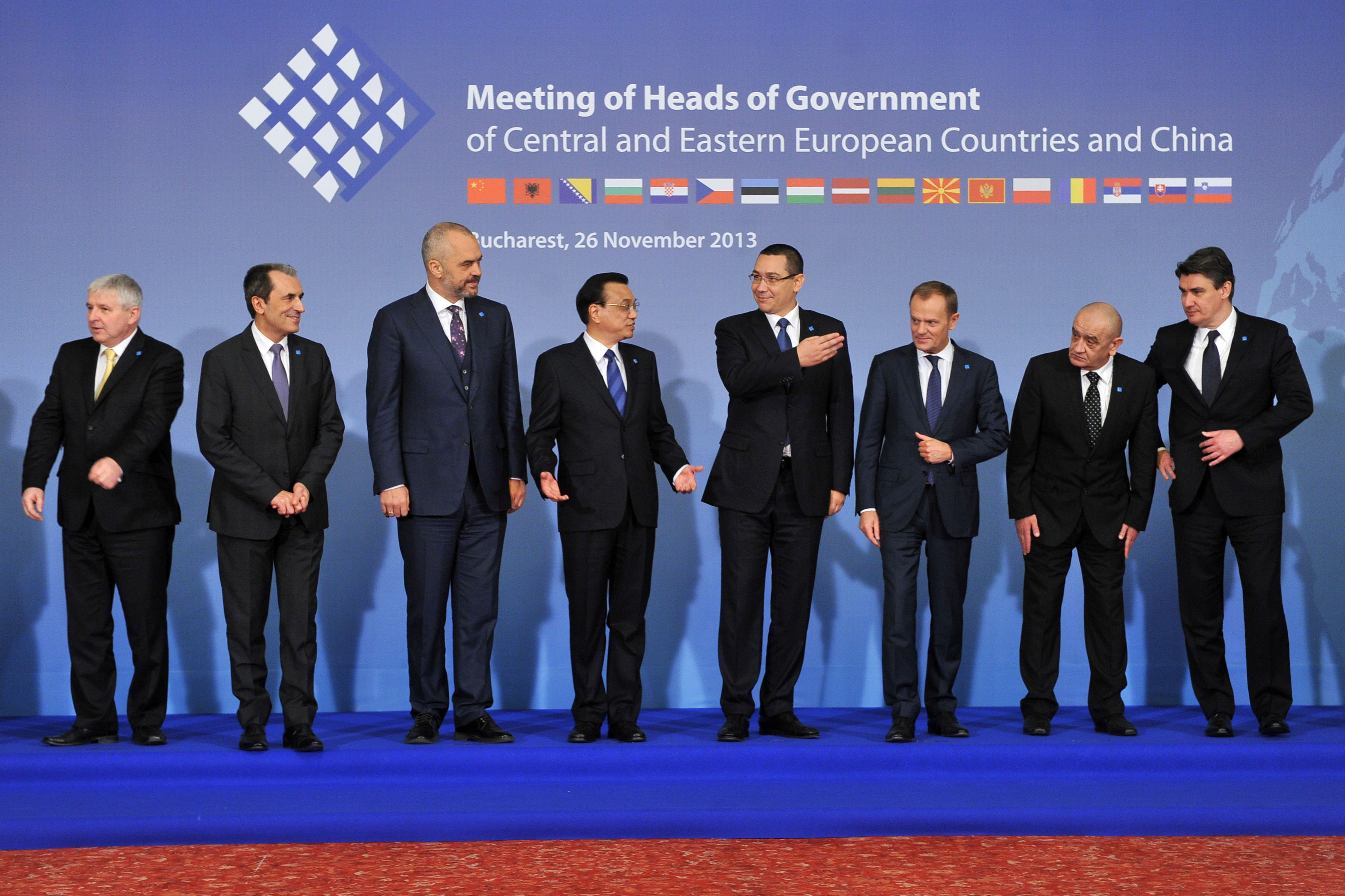 Victor Ponta la Summit-ul Premierilor din Europa Centrala si de Est - China, Bucuresti